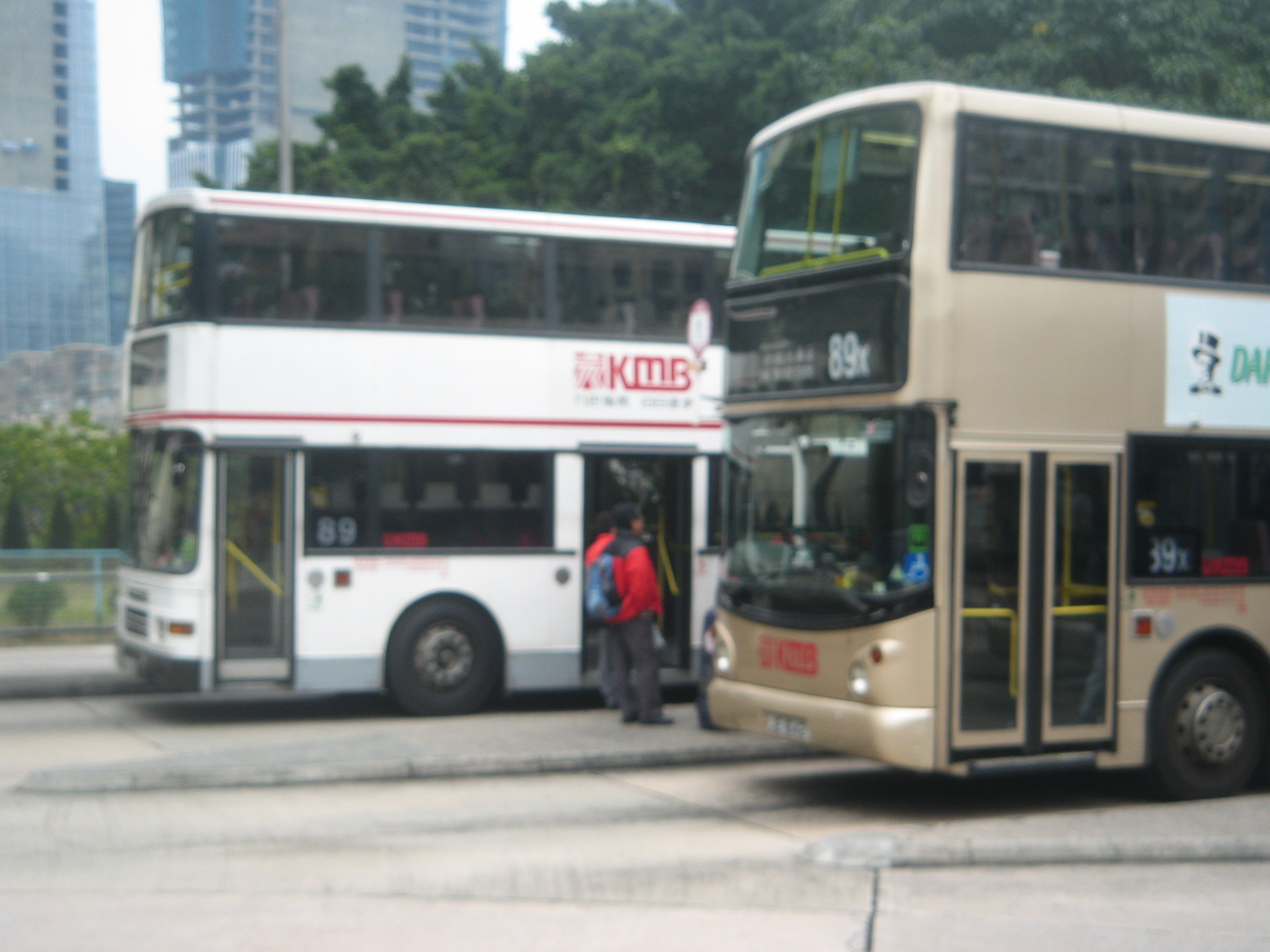 中文（香港）: 九巴89、89X線。